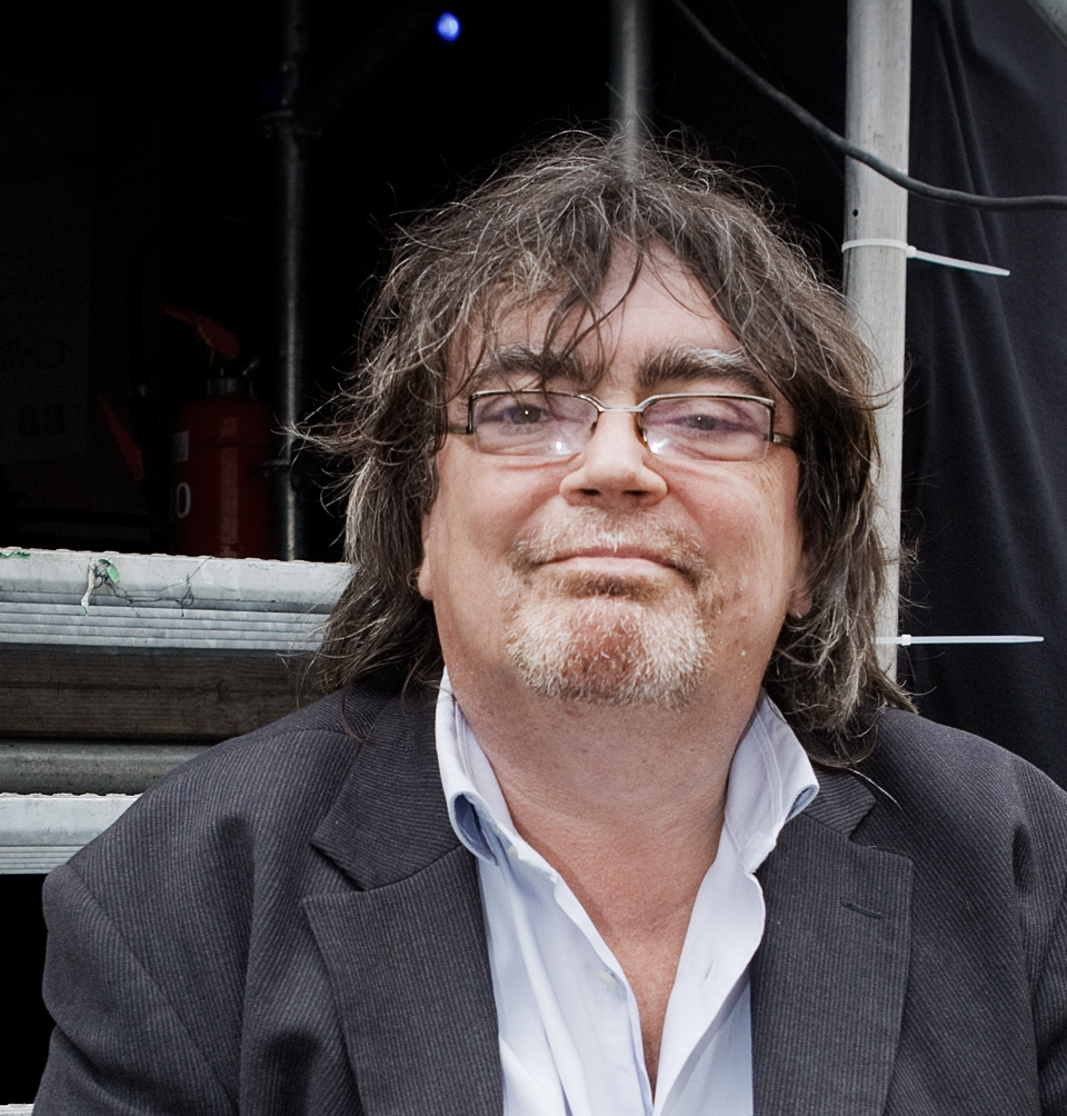 Dany Vandenbossche, politicus.